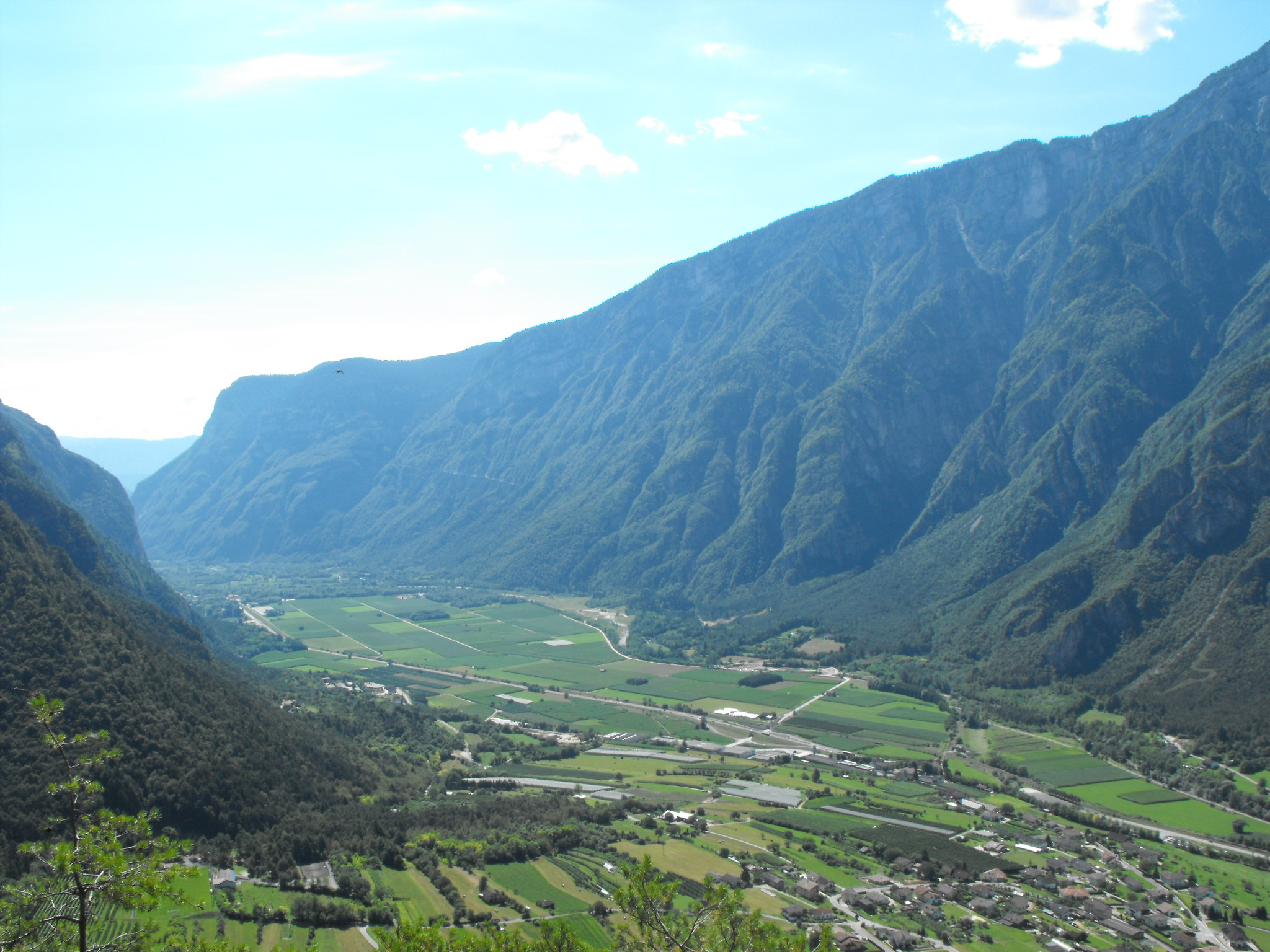 VIsta della Valsugana in direzione est dal Monte Lefre